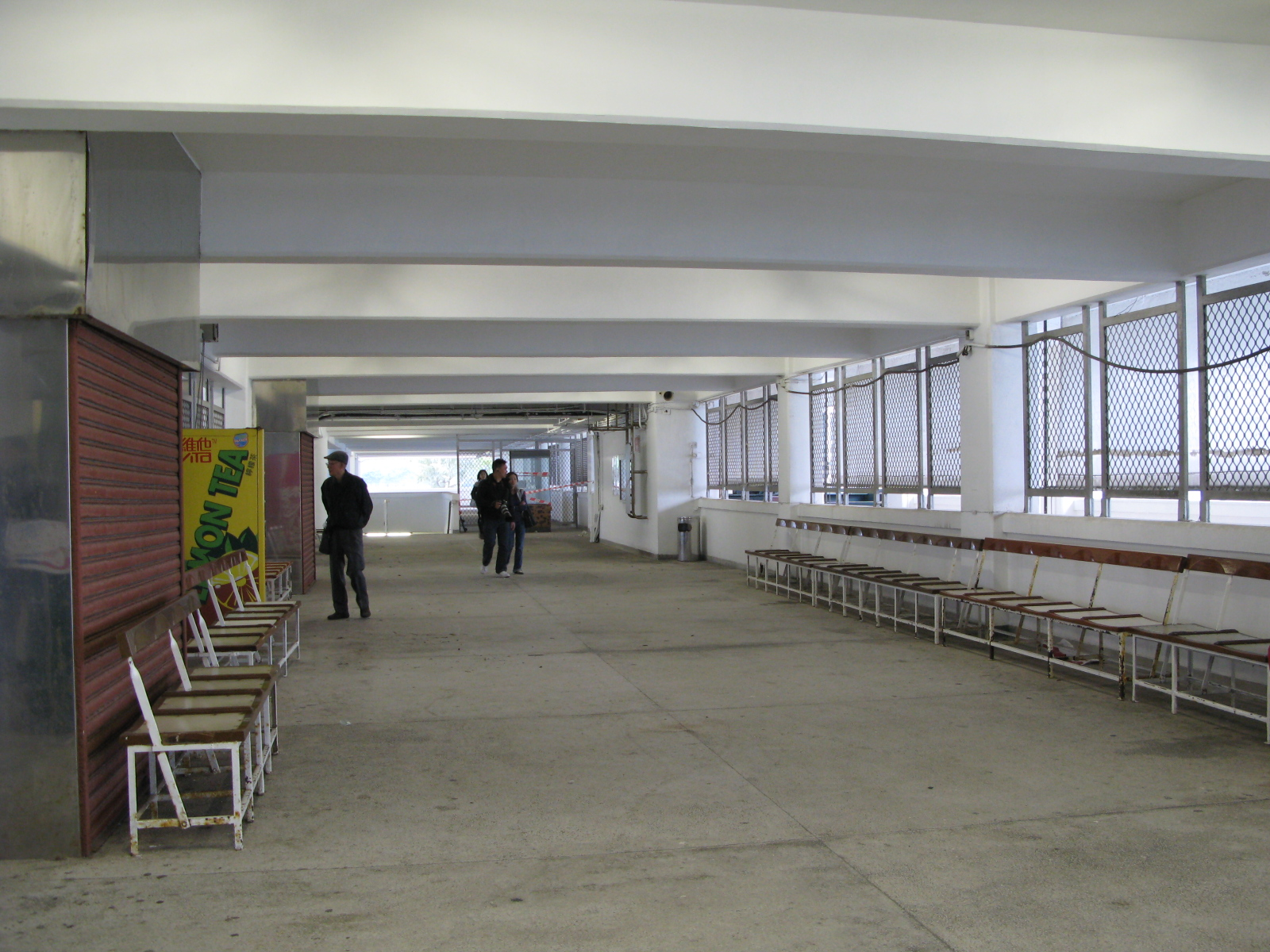 Hung Hom Pier Waiting Area